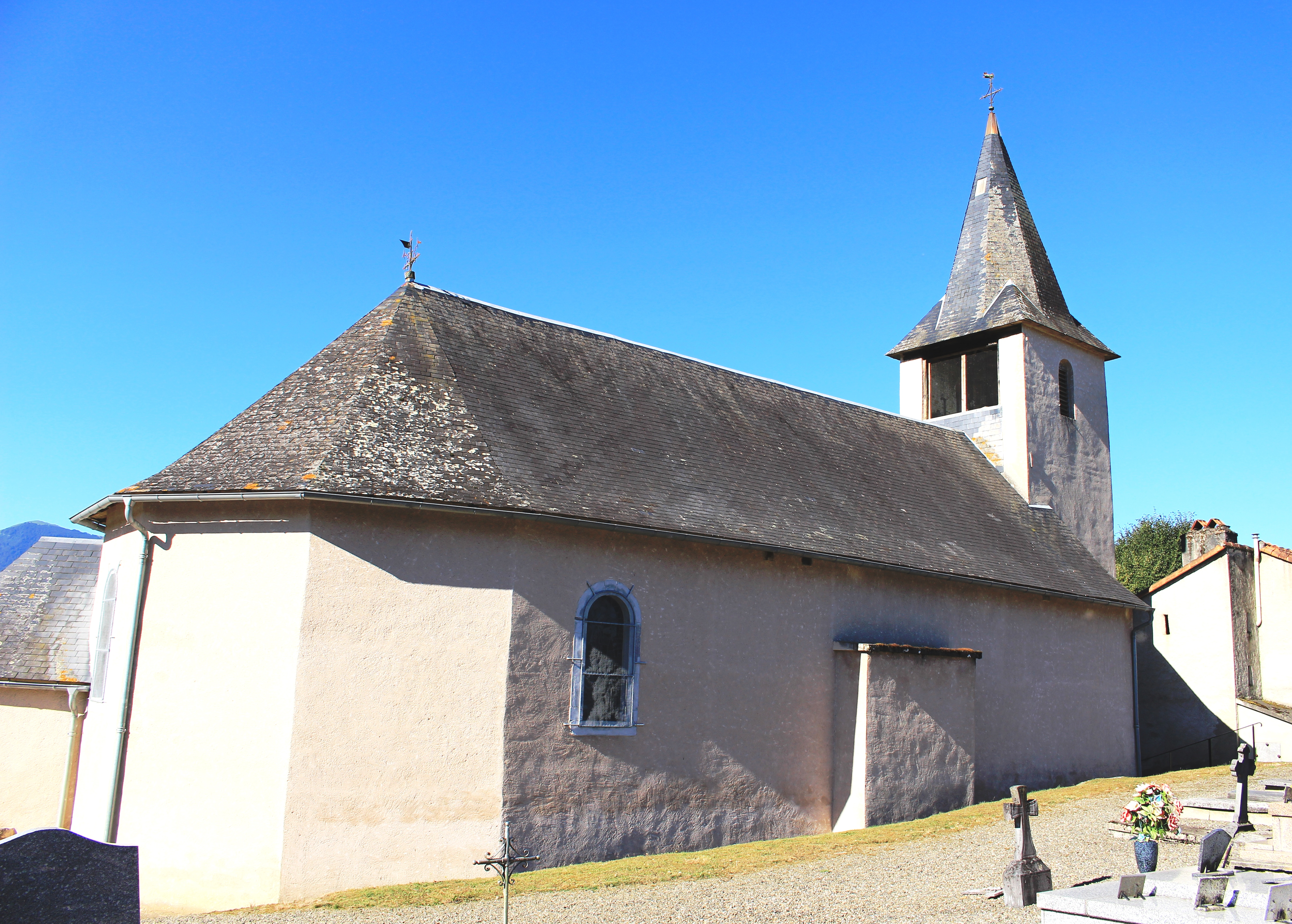 Église Saint-Nicolas de Bonnemazon (Hautes-Pyrénées)